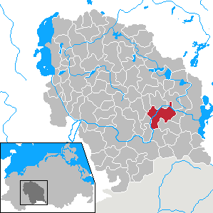 Lübz in Mecklenburg-Vorpommern - District Parchim